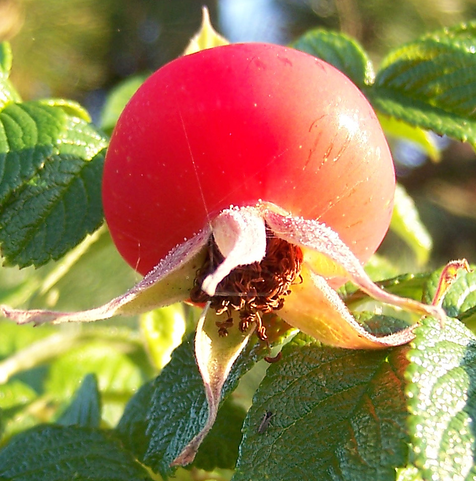 Frucht der Kartoffelrose (Rosa rugosa) im Oktober auf der Nordseeinsel Spiekeroog